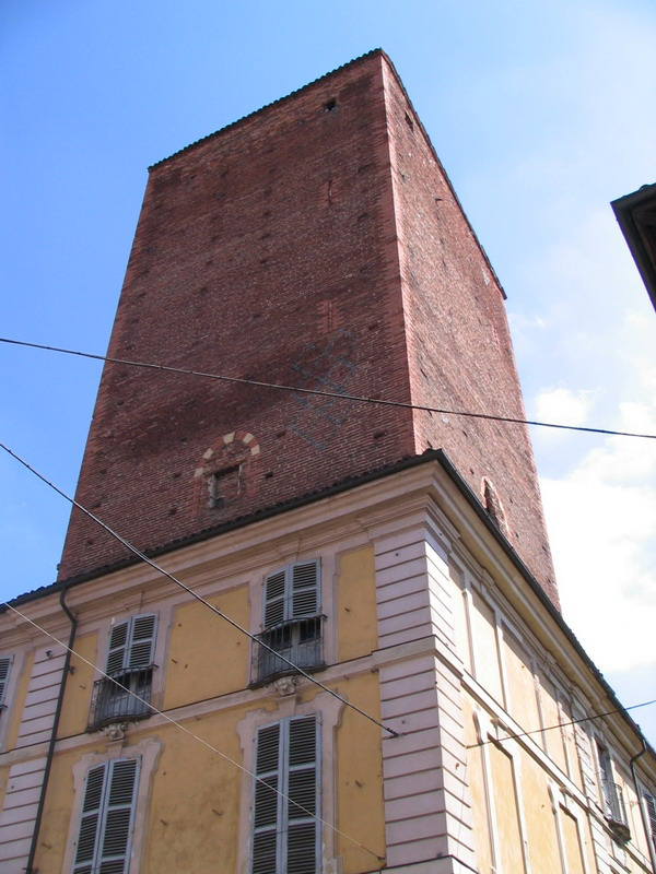 Asti, Torre Gazzelli. Foto fatta da me, Faberh 2006.